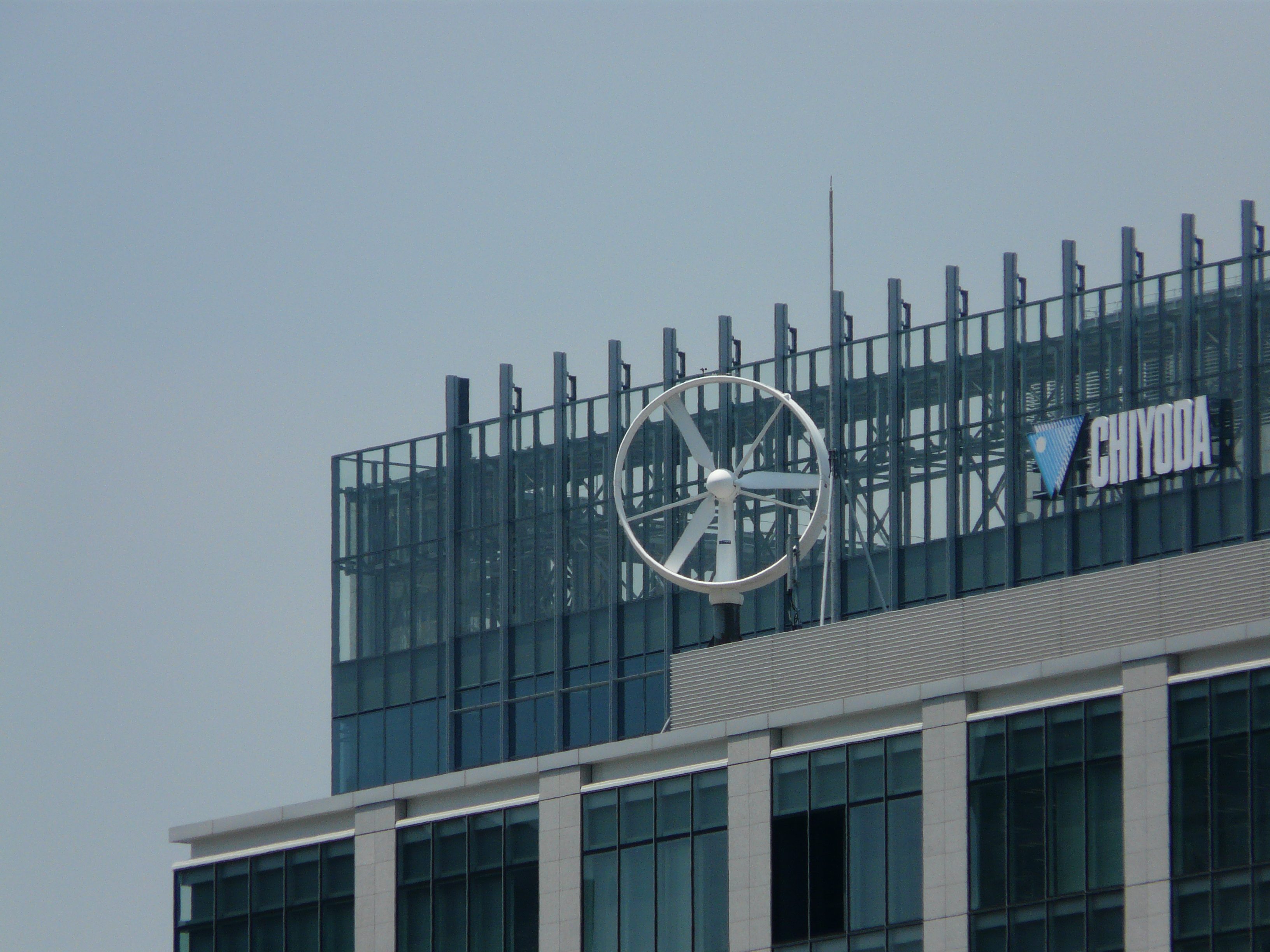 MMパークビル屋上の小型風力発電機。